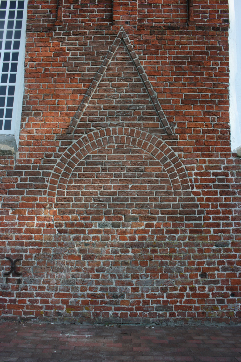 Kreisbahn Aurich Reste lombardisch beeinflusster Formen an der Kirche Victorbur